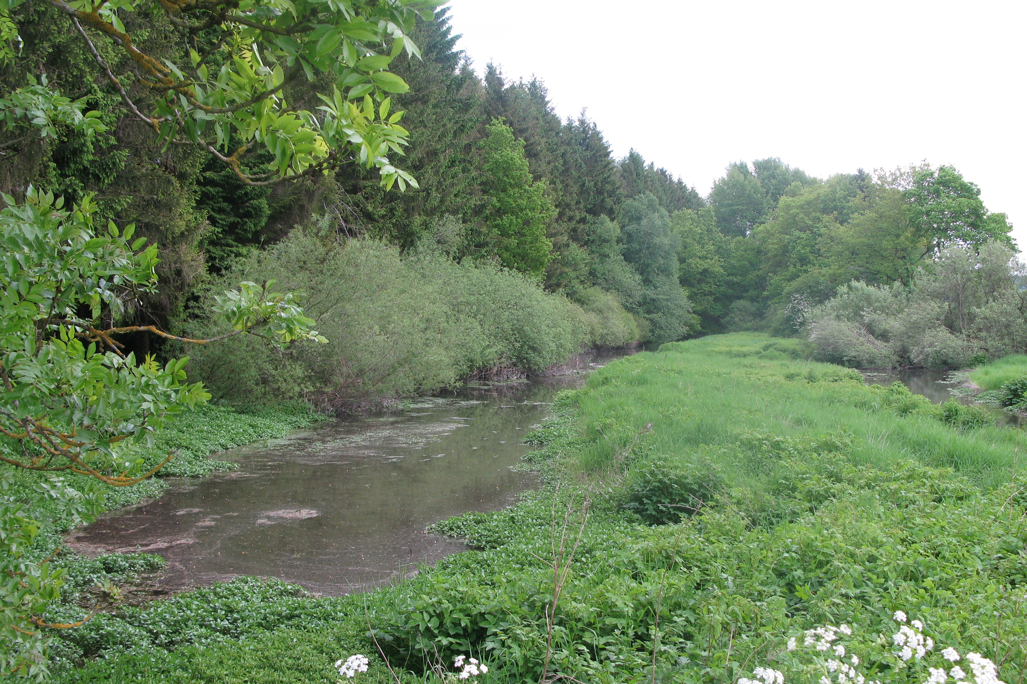 De Kanal zu Bernistap vun der Bréck an Direktioun Tunnel gekuckt. Meuse-Musel